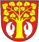 znak obce